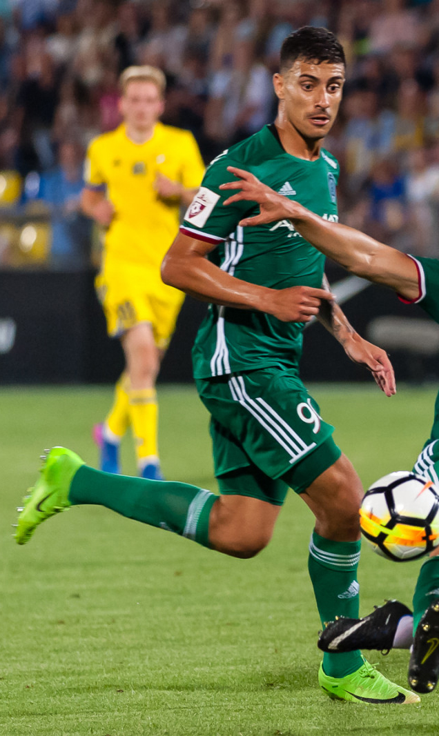 «Ростов» - «Ахмат»